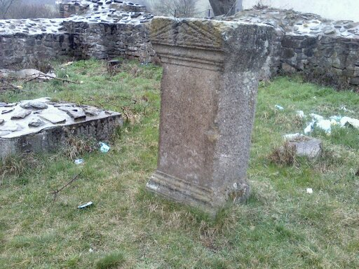 Srpski (latinica): Municipium DD je bio rimski grad čiji je život trajao od II do IV veka nove ere, a njegovi ostaci se nalaze u ataru naselja Sočanice, kod Ibra.